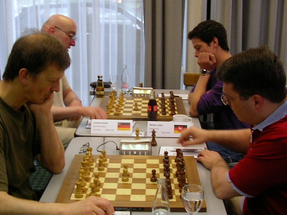 Herbert Bastian - Ullrich Krause, 2011 bei der Deutschen Schachmeisterschaft in Bonn; im Hintergrund die Partie Andreas Kessler - Nikolas Lubbe.